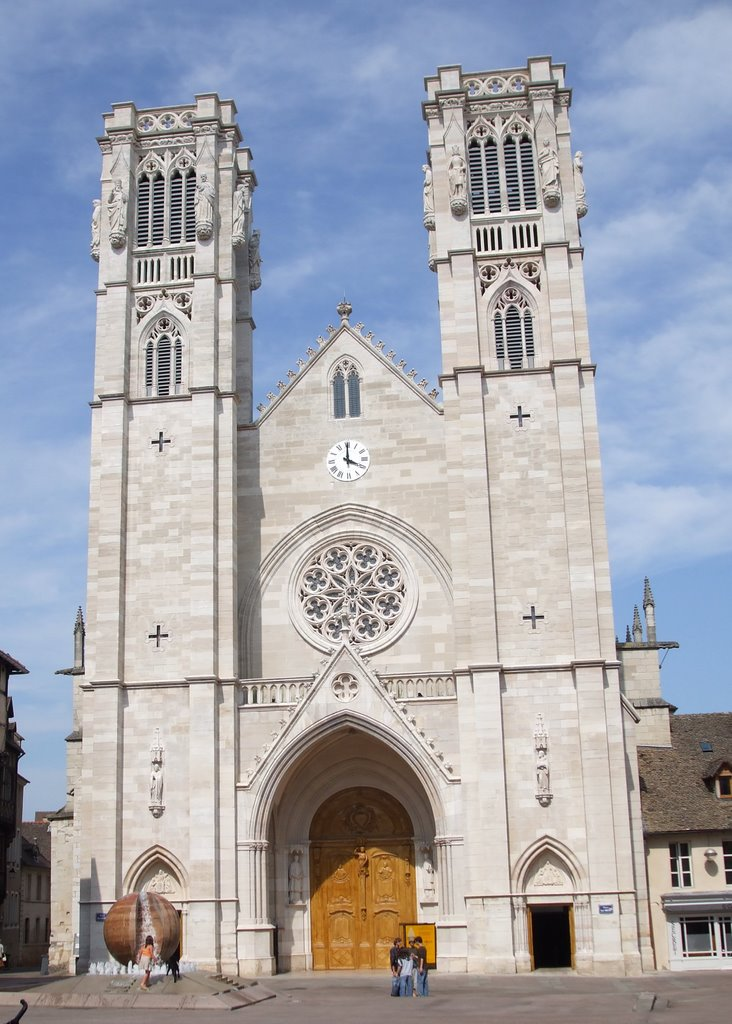 Façade de l'entrée de la cathédrale Saint Vincent à Chalon-sur-Saône